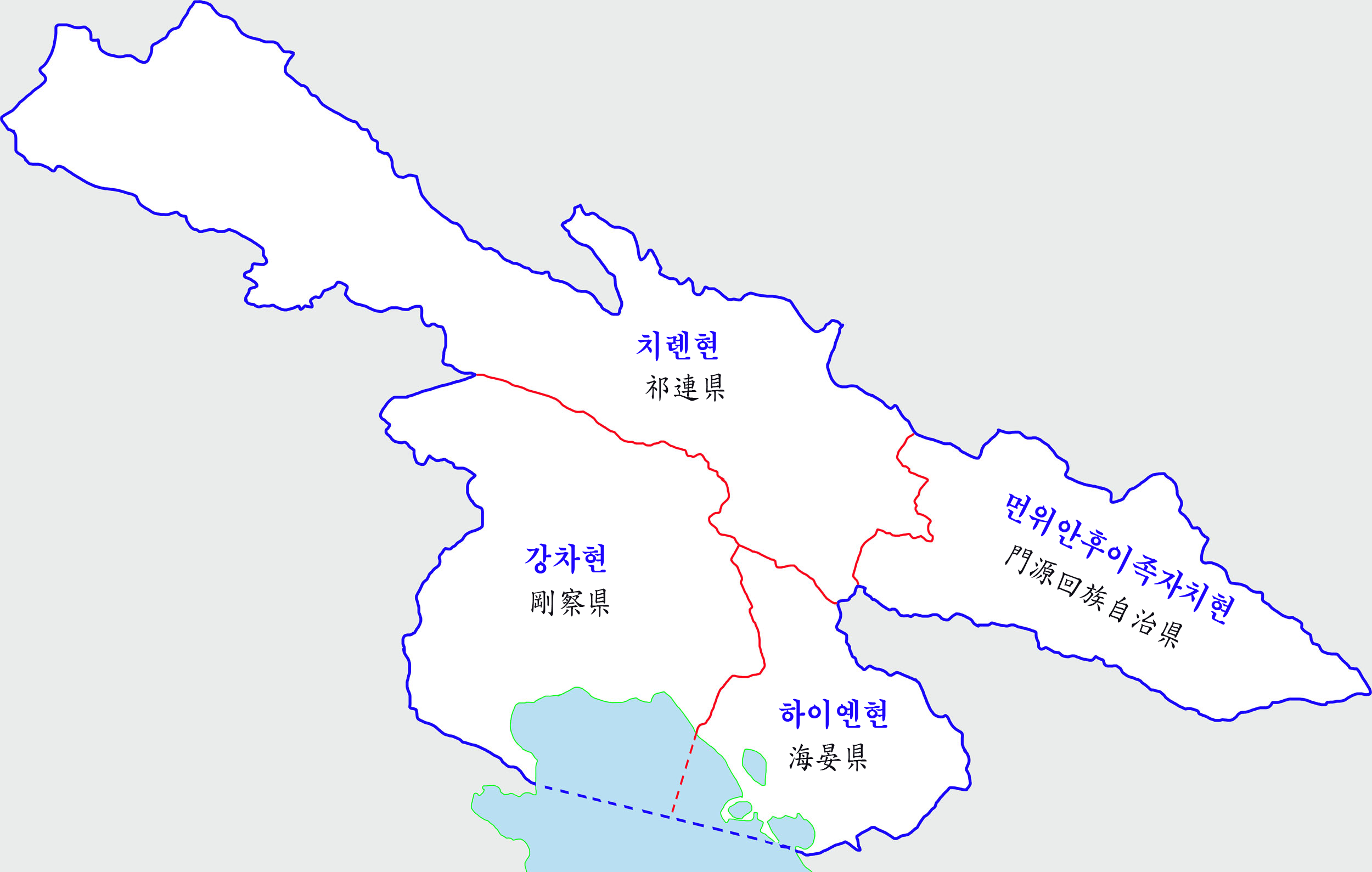 하이베이티베트자치주 행정구역